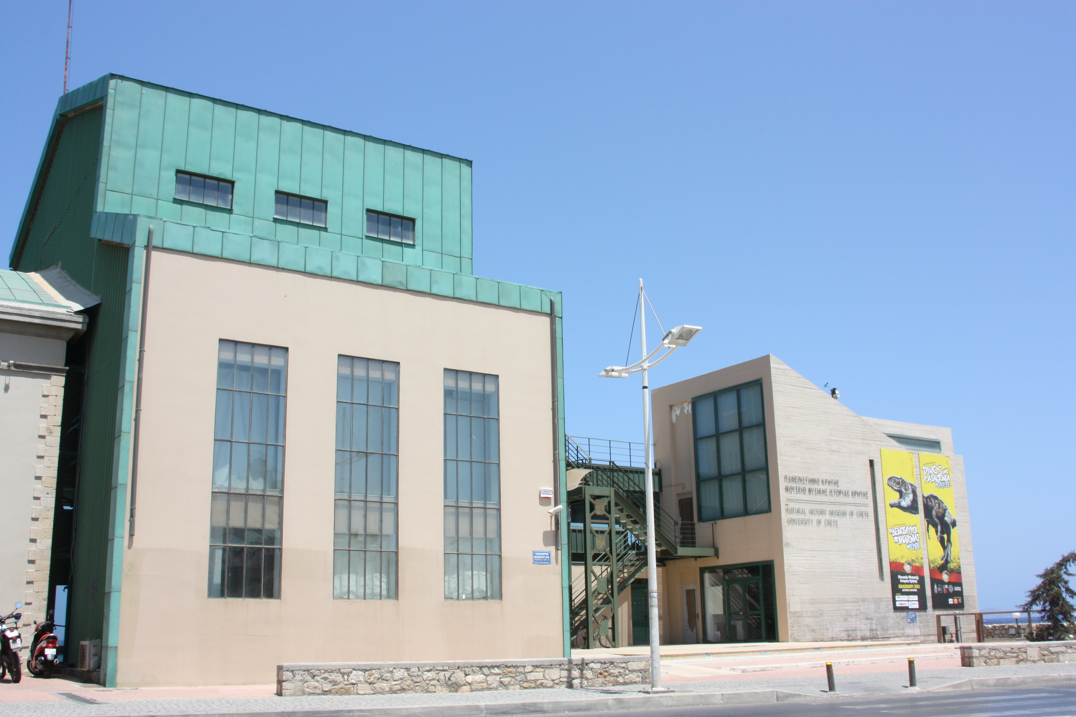 Musée histoire naturelle de Crète à Héraklion